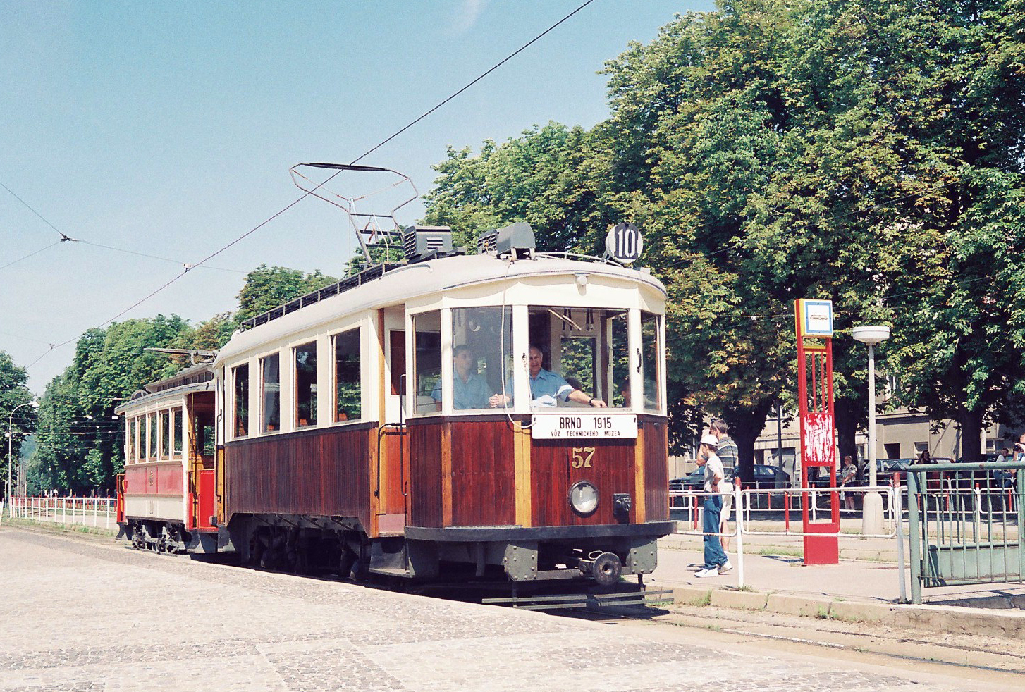 Tramvaj evidenčního čísla 57 na dopravní nostalgii v roce 2000 – archiv Jiřího Vobeckého